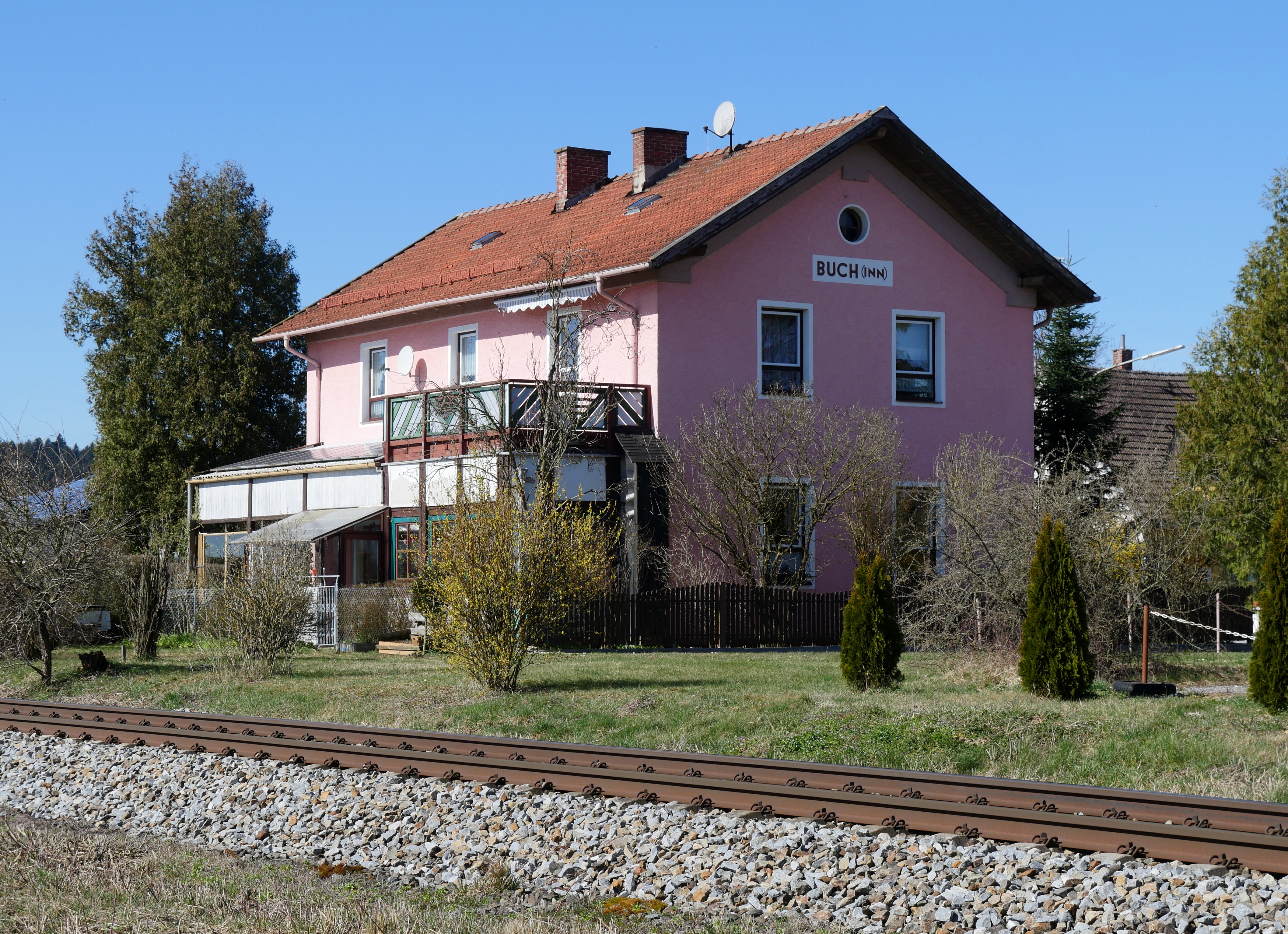 Ehemaliges Empfangsgebäude des 1986 aufgelassenen Bahnhofs Buch (Inn) von der Gleisseite, heute als Wohnhaus genutzt.